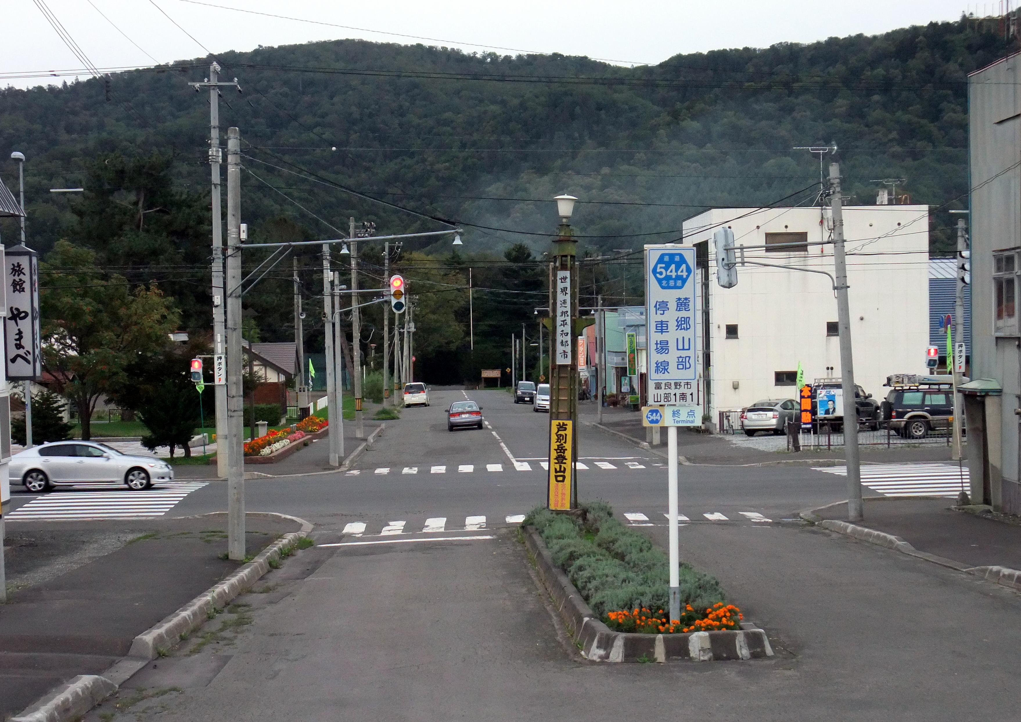 山部駅前交差点